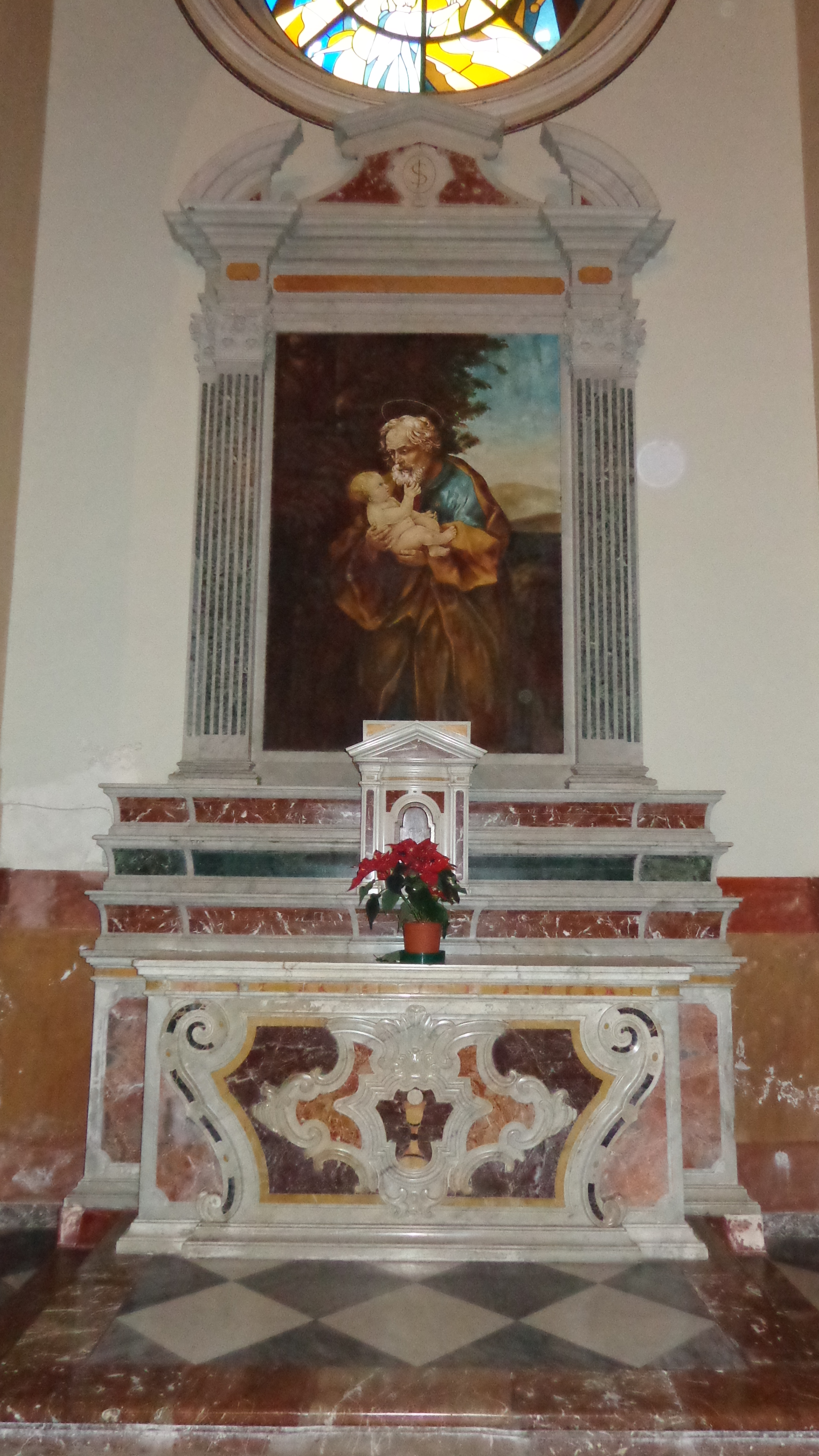 Altare di San Giuseppe